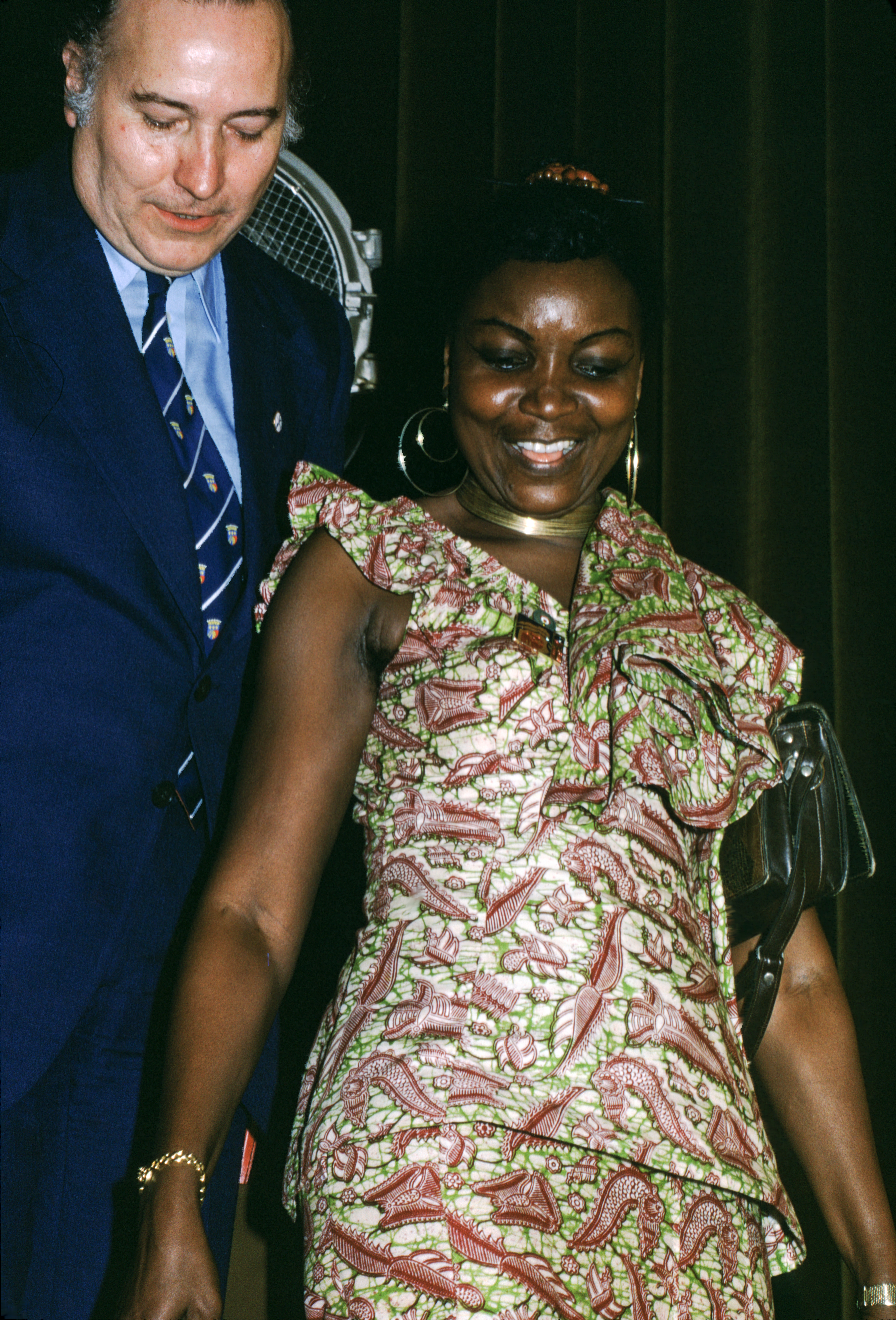 Colloque sur la promotion de la femme face aux responsabilités communales, organisé par la Fédération mondiale des Villes jumelées à Lomé au Togo du 26 au 31 juillet 1975. Marguerite Adjoavi Trenou (Togo)